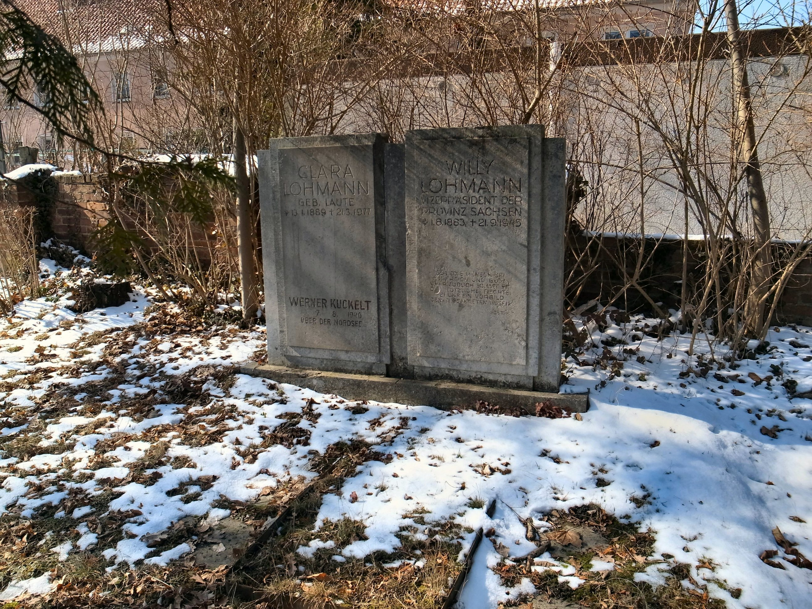 Ruhestätte von Willy Lohmann in Dessau, Friedhof Ziebigk